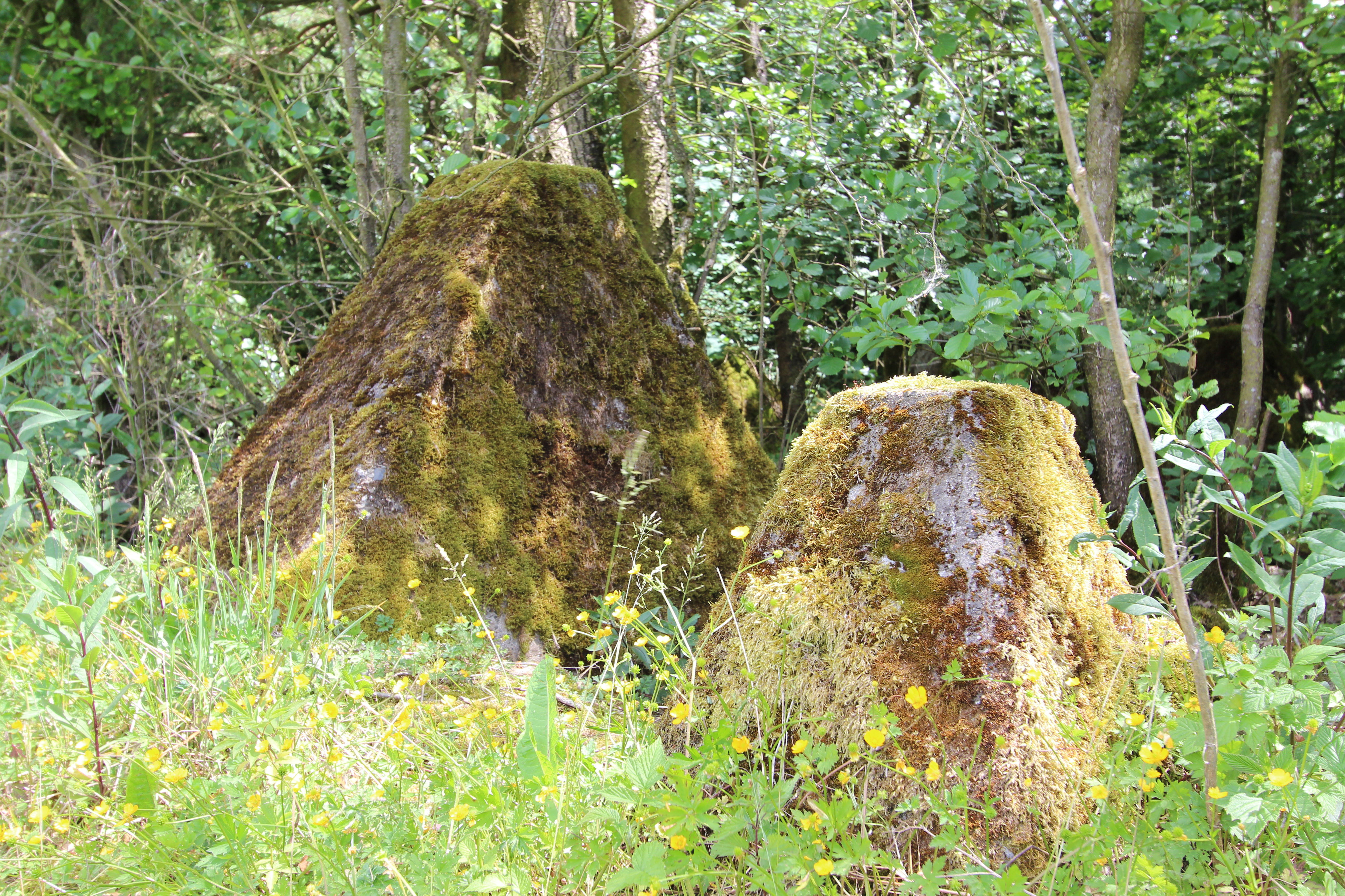 54597 Ormont, an der westlichen Grenze der Ortsgemeinde. Mehrere sehr gut erhaltene Abschnitte der Höckerlinie des Westwalls. Aufnahme von 2017.